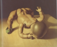 Negerpuppe, Gemälde von Peter Birkhäuser